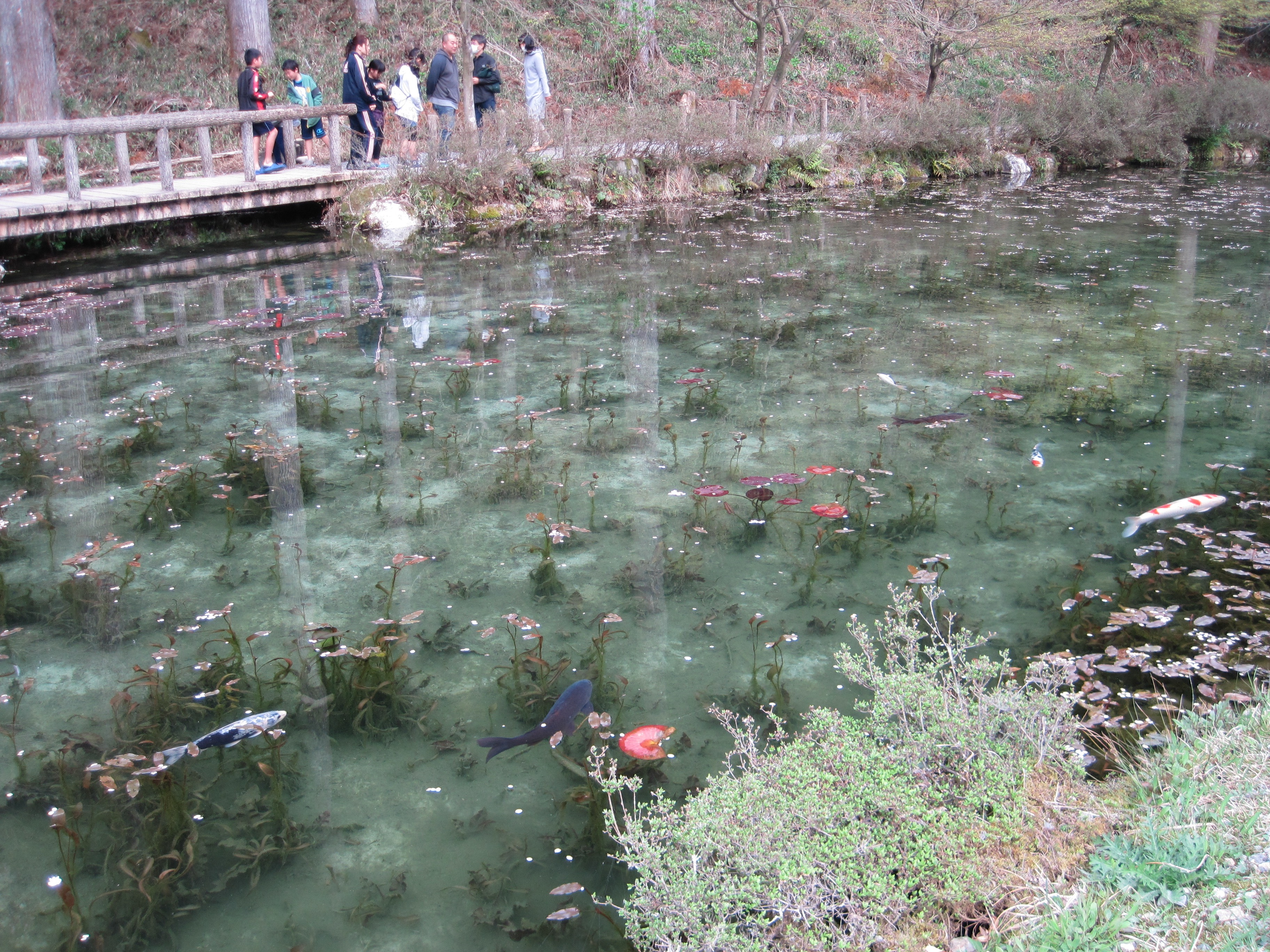 通称モネの池全景２